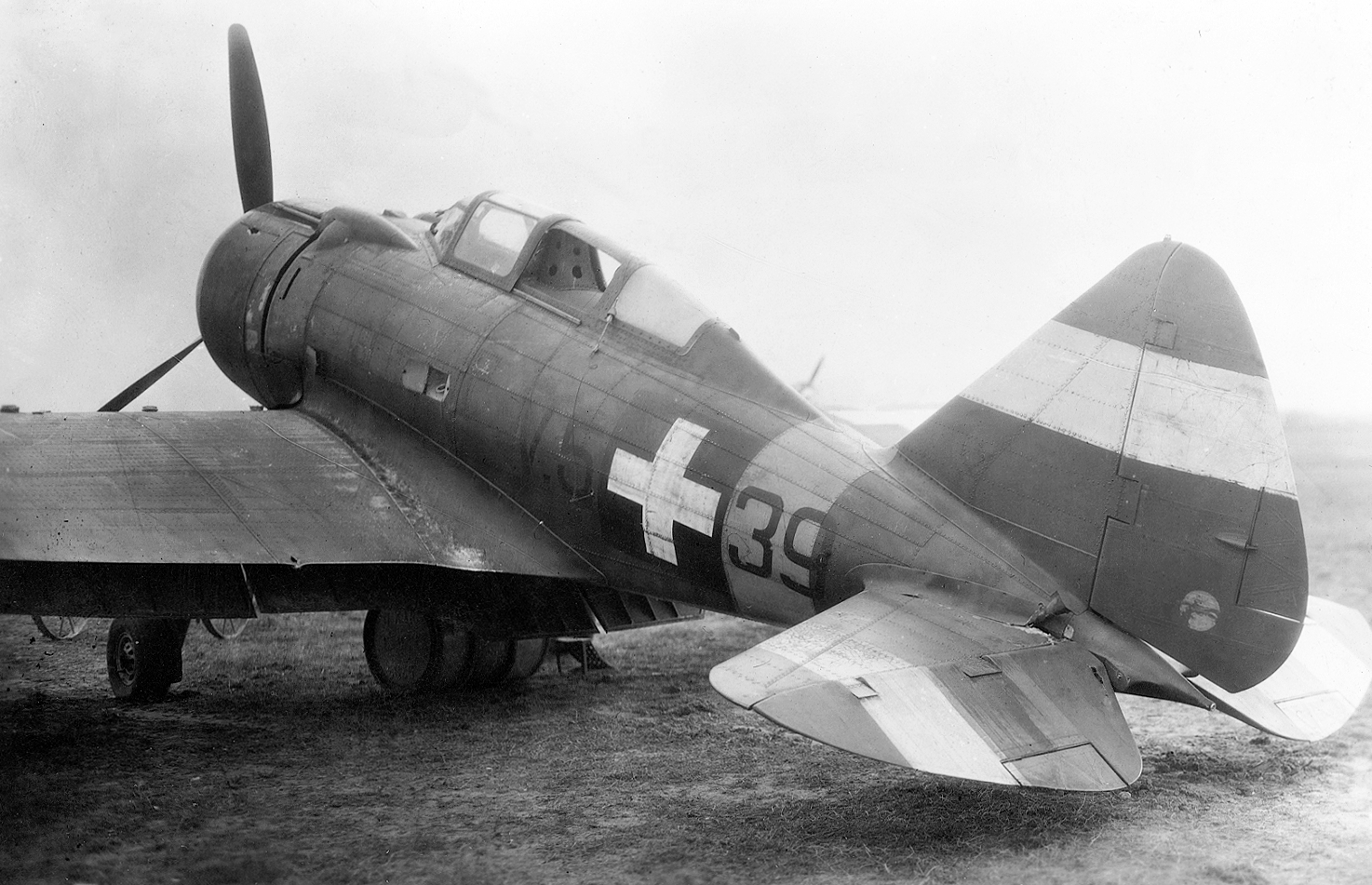 repülőtér, 1944. április 13. Kass Ferenc őrmester légiharcban megsérült MÁVAG Héja II. vadászrepülőgépe. Location: Hungary Tags: Royal Hungarian Air Force, MÁVAG-brand, Hungarian brand, airplane, fighter;plane, second World War Title: repülőtér, 1944. április 13. Kass Ferenc őrmester légiharcban megsérült MÁVAG Héja II. vadászrepülőgépe.